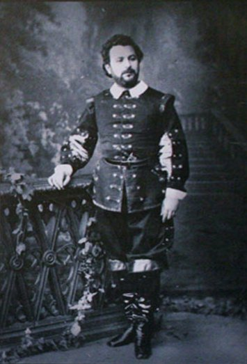 Foto del tenor Andrés Marín posando caracterizado para una actuación.